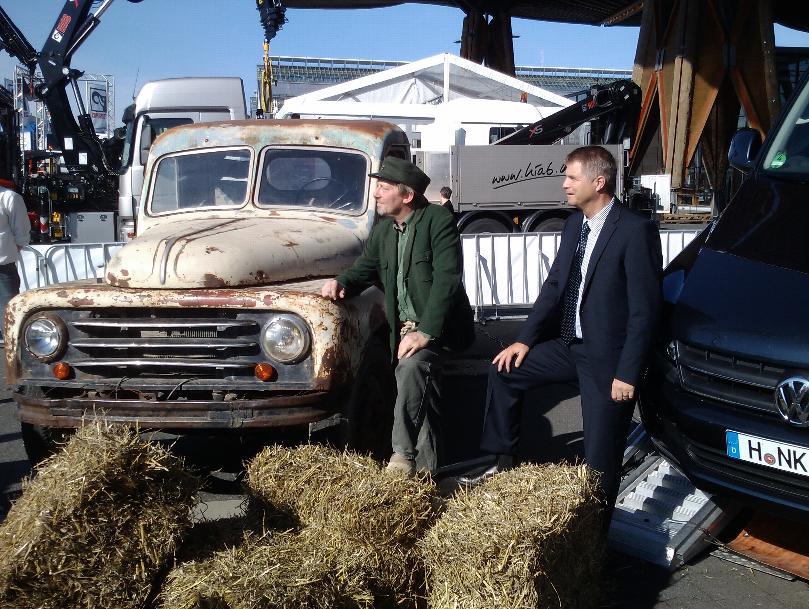 Dietmar Wischmeyer als Günther der Treckerfahrer auf der IAA Nutzfahrzeuge in Hannover